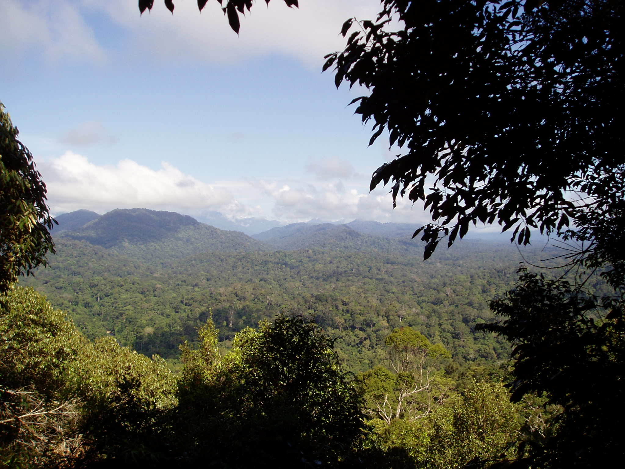 View from Bukit Terisek